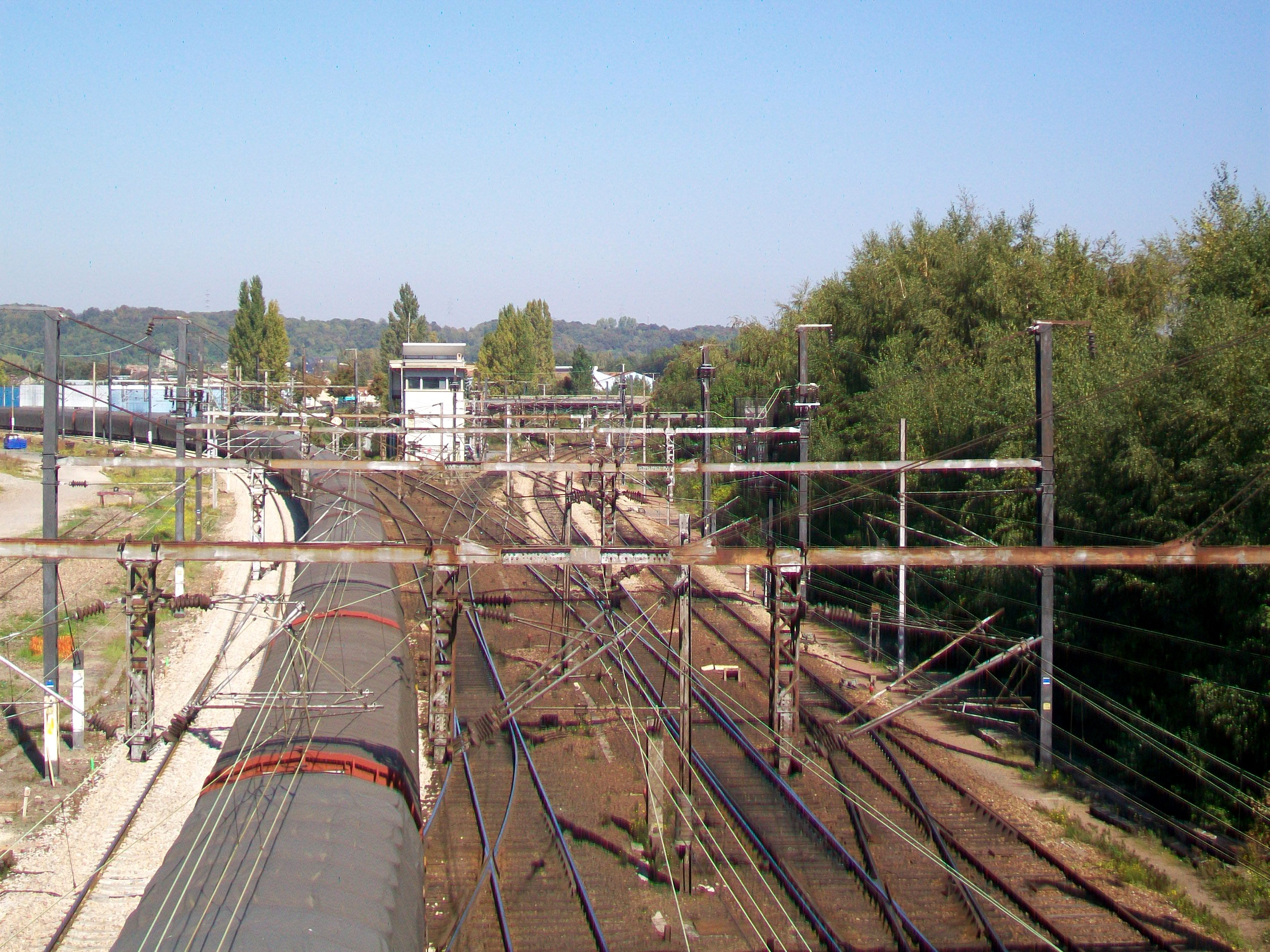 La bifurcation à niveau de Nogent, où se séparent les lignes ferroviaires de Paris à Amiens et de Paris à Saint-Quentin, à l'extrémité nord-est de la gare de Creil.